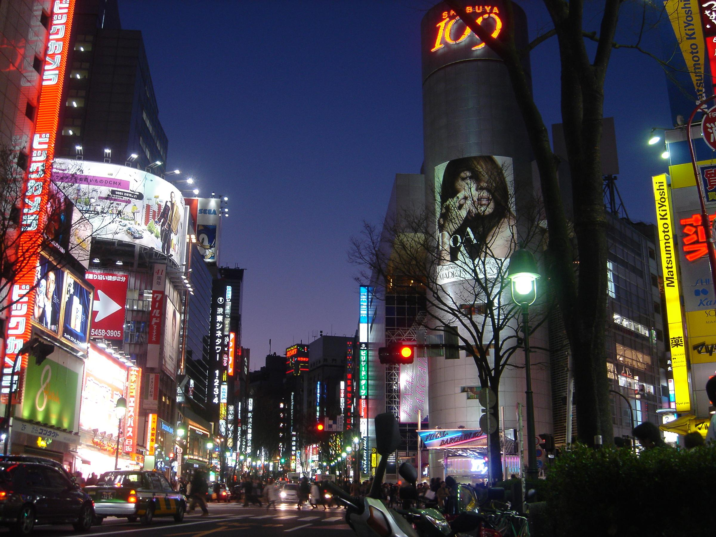 Shibuya at dusk - Tokyo - Japan